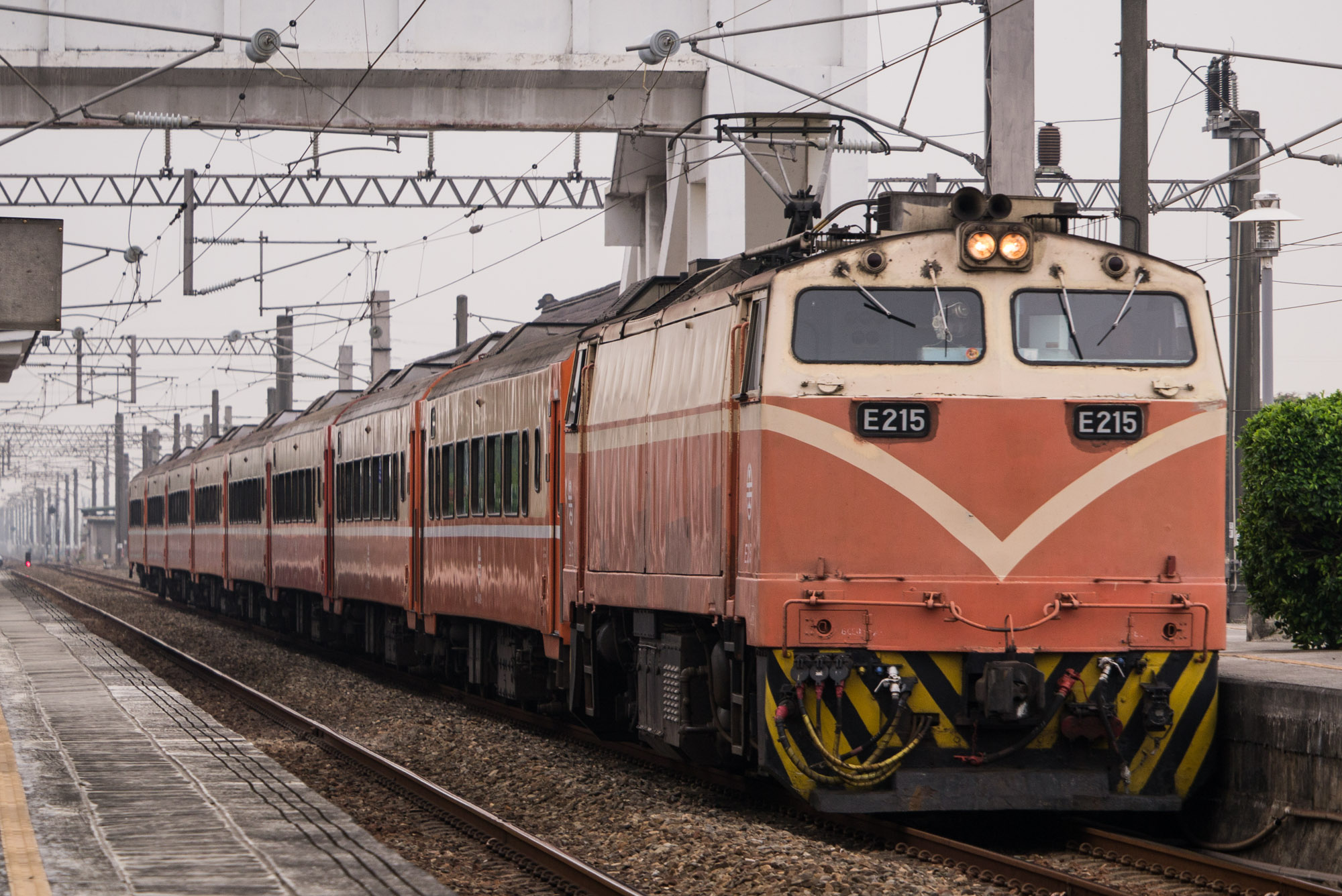 臺灣鐵路管理局E215電力機車牽引的第516車次莒光號順行西部幹線南段，行經後壁車站。